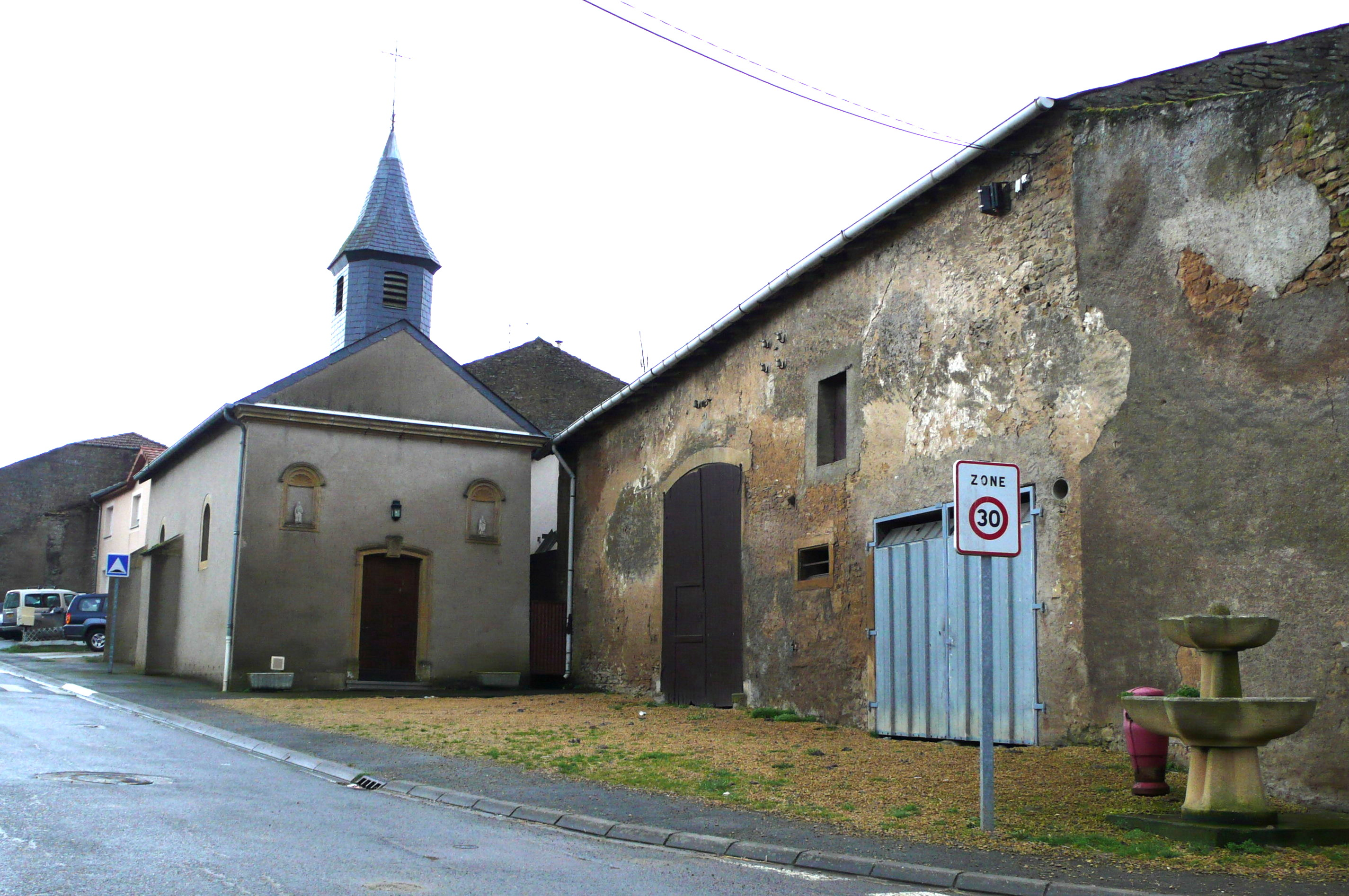 Kapell vun Dodenom.